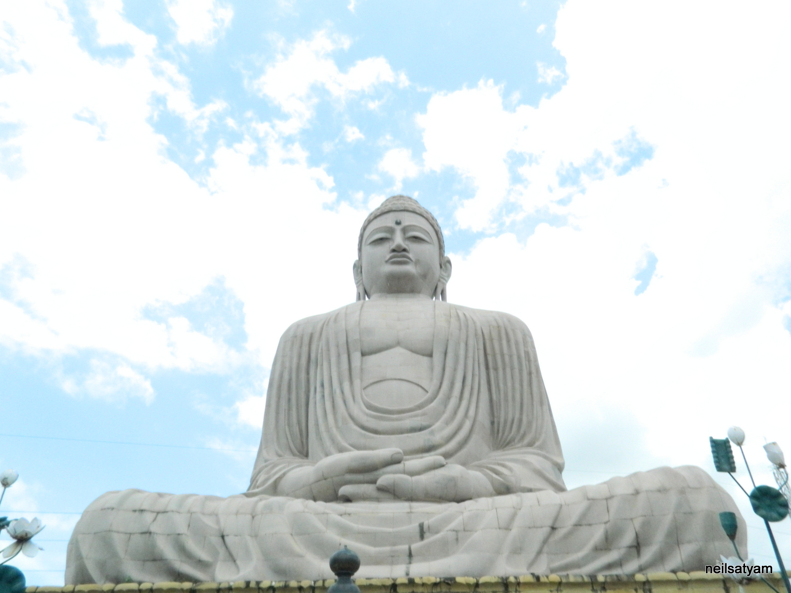 80 feet Buddha Statue